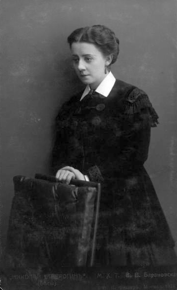 Портрет актрисы Малого Художественного Театра Веры Барановской